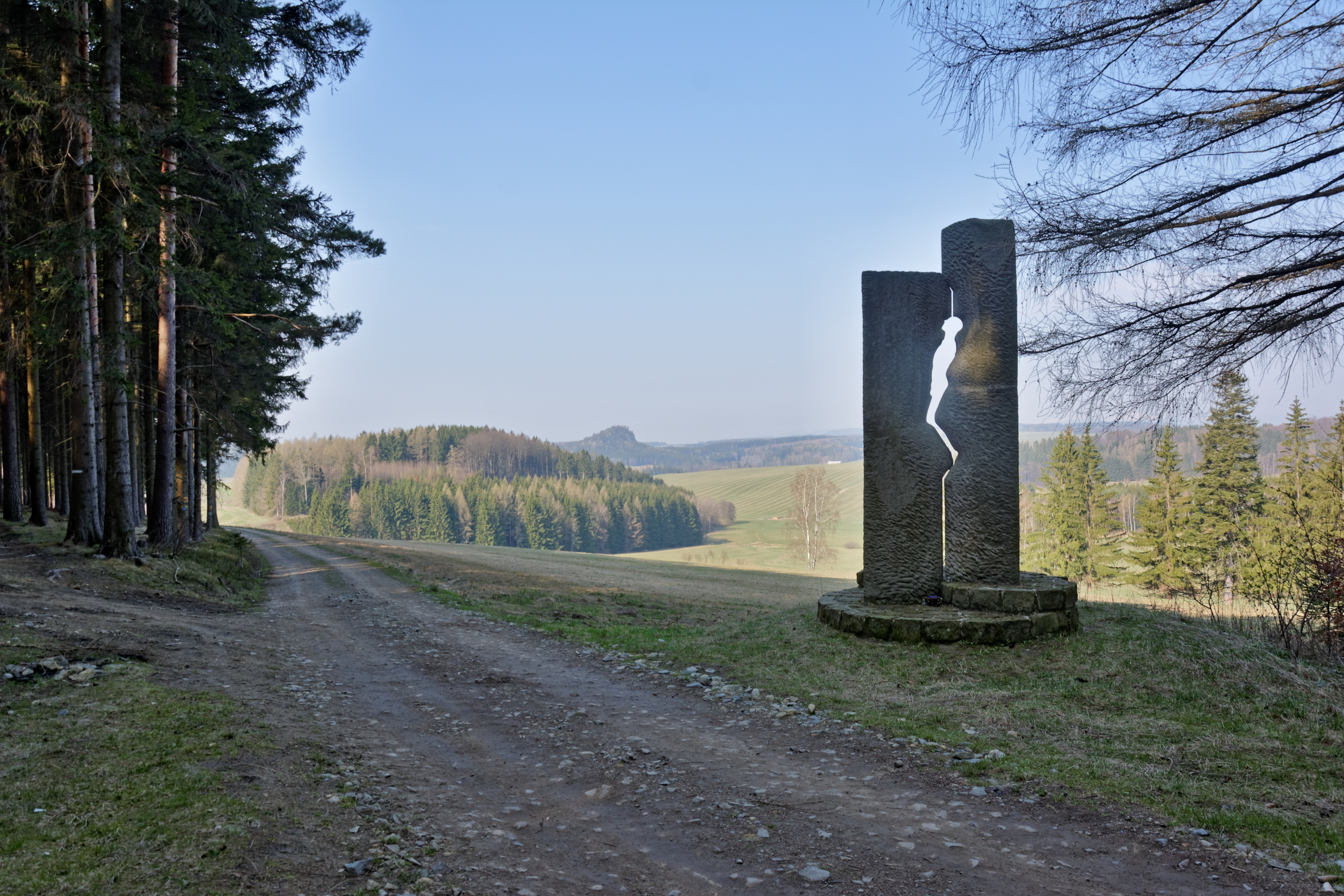 Teplice nad Metují, Buková hora, památník obětem divokého odsunu na Bukové hoře v létě 1945.